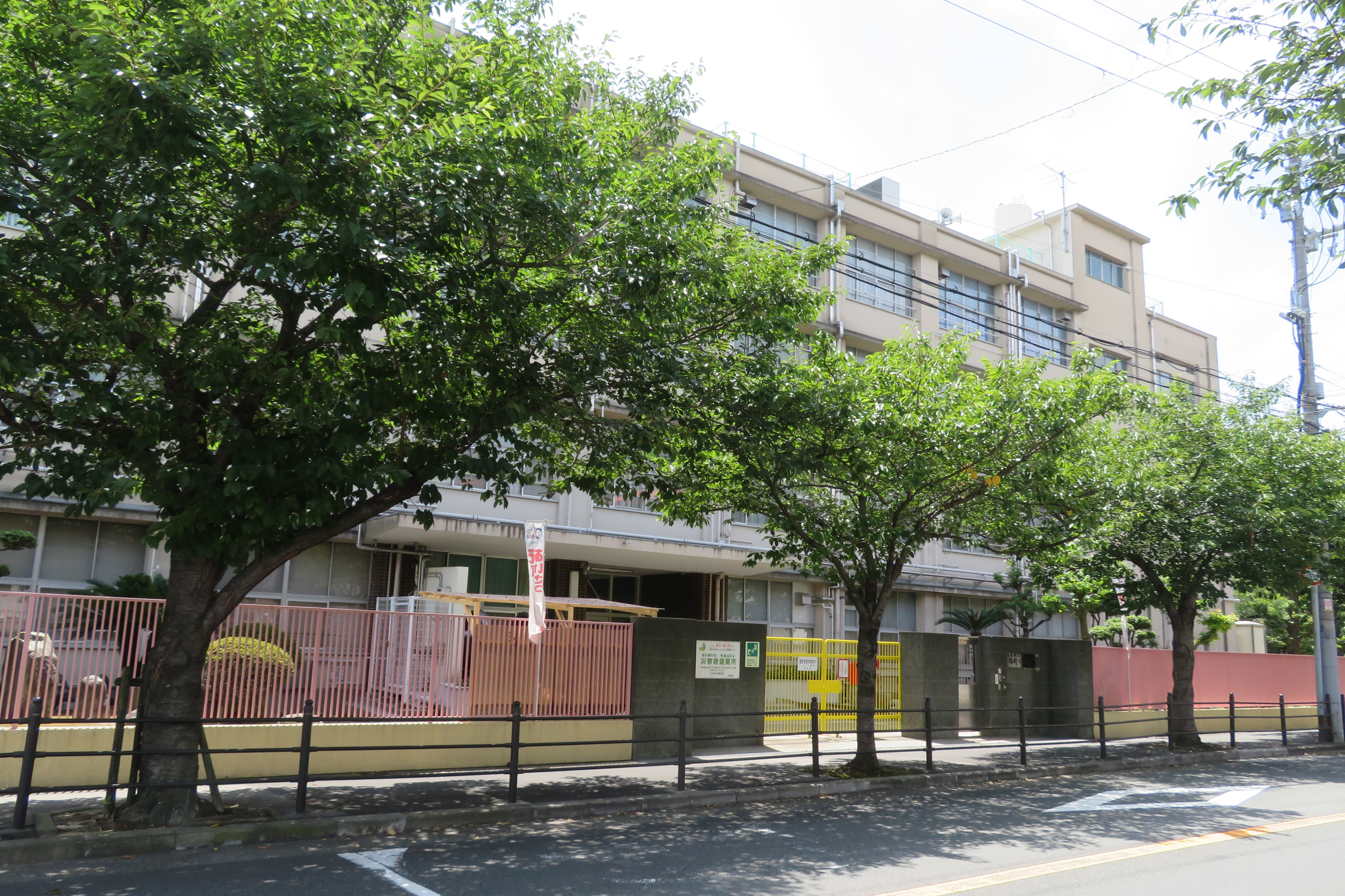 大阪市立鶴町小学校